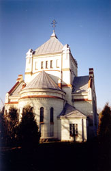 Церква Св.Дмитра у с. Оброшин біля Львова. 1914 р., архітектори Олександр Лушпинський, Тадеуш Обмінський